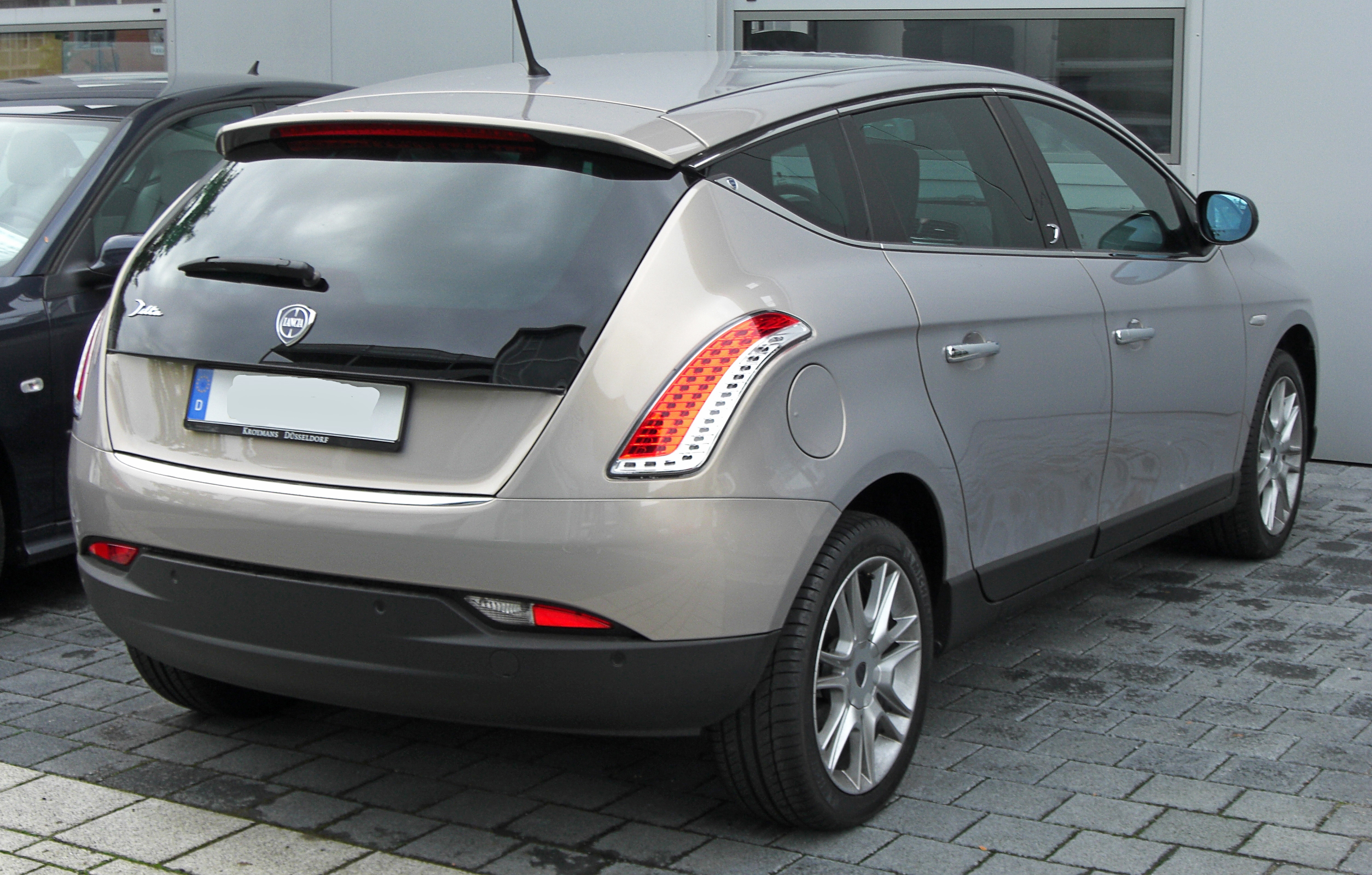 Lancia Delta